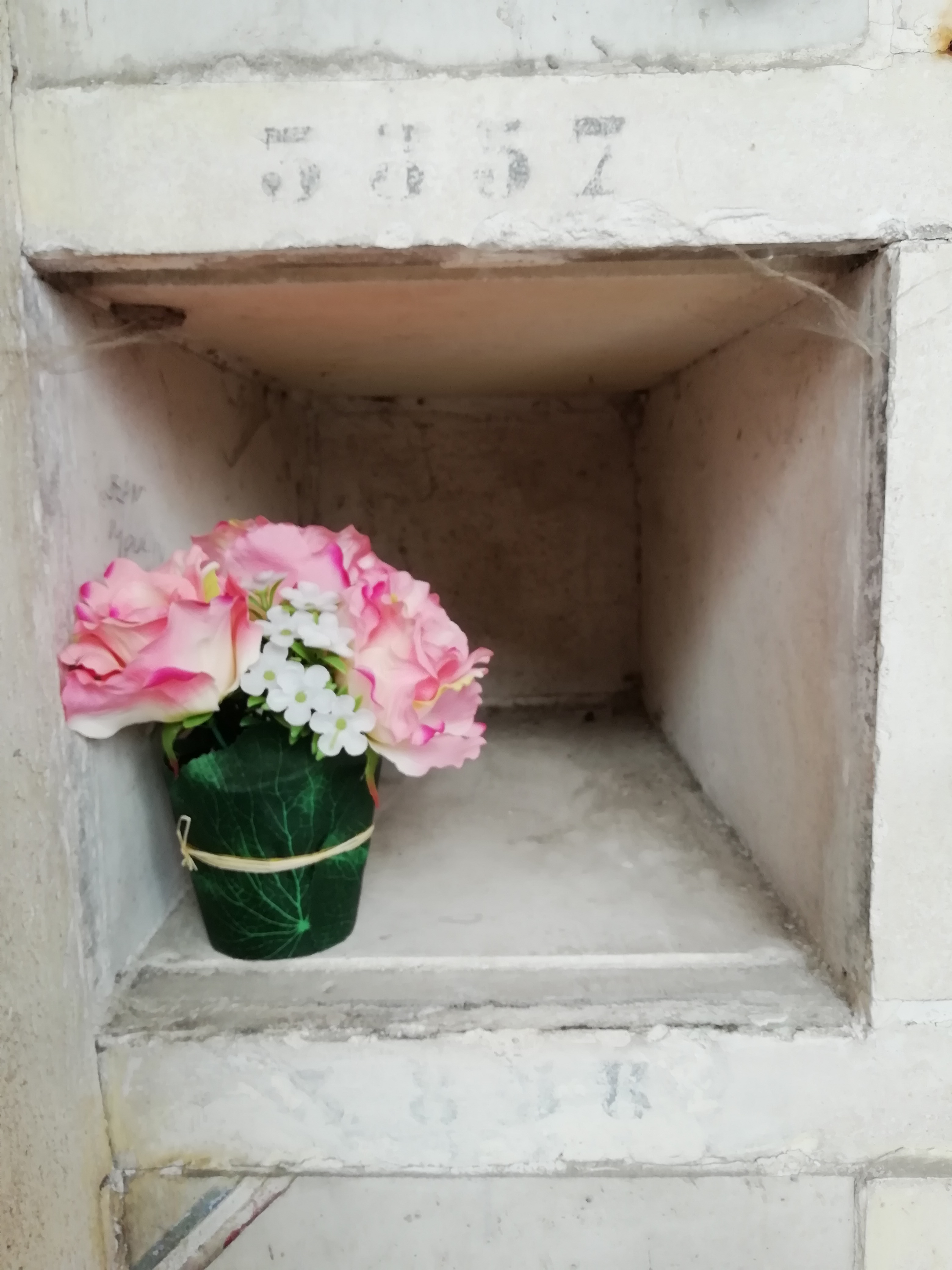 Cénotaphe de Jean Moulin au columbarium du cimetière du Père Lachaise.